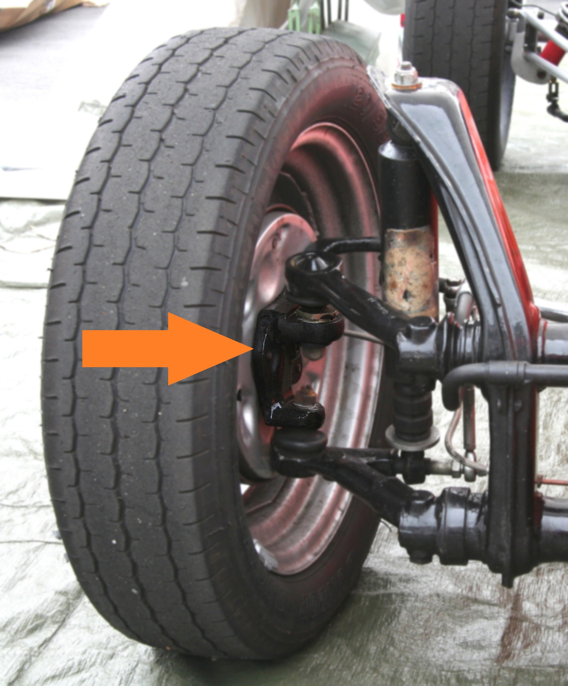 Achsschenkel an der Vorderachse eines VW Käfer, hier in einem Formel-V-Rennwagen